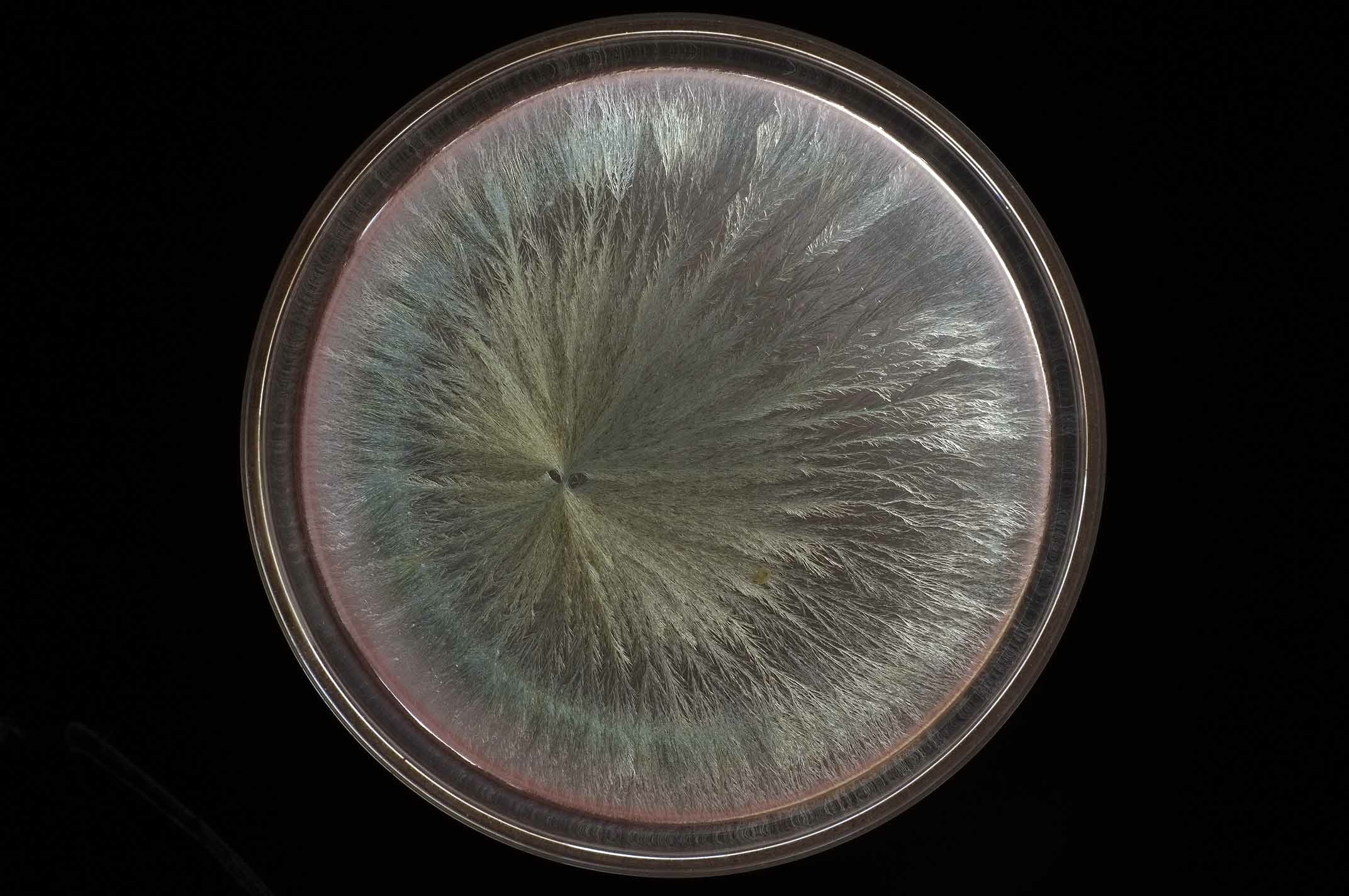 Cristallogramme d'un vin rouge. Réalisé par Christian Marcel, Solliès-Pont (83), France